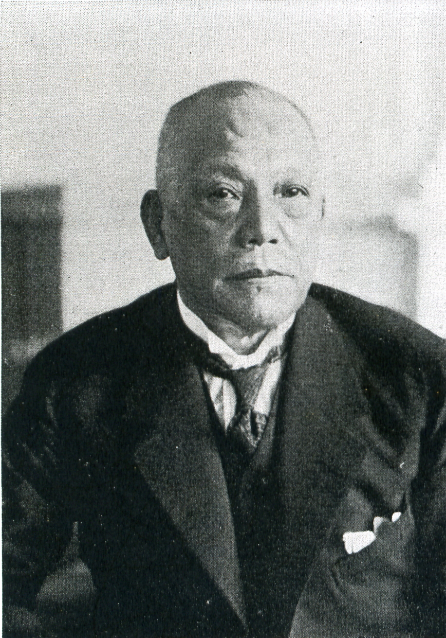 この写真は、山本条太郎（1867-1936）の写真です。